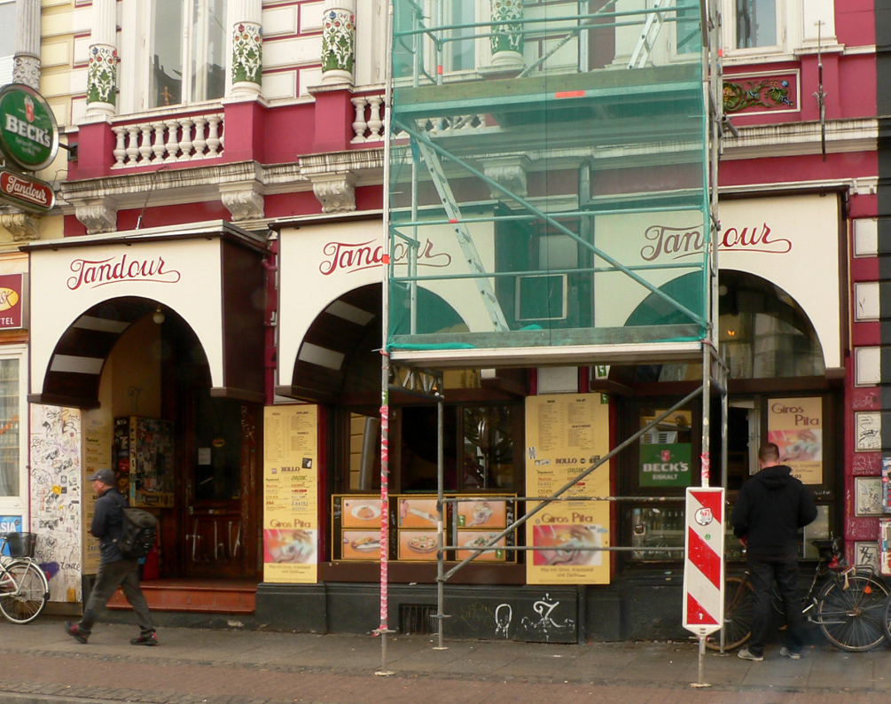 Rollo Imbiss Tandour in Bremen